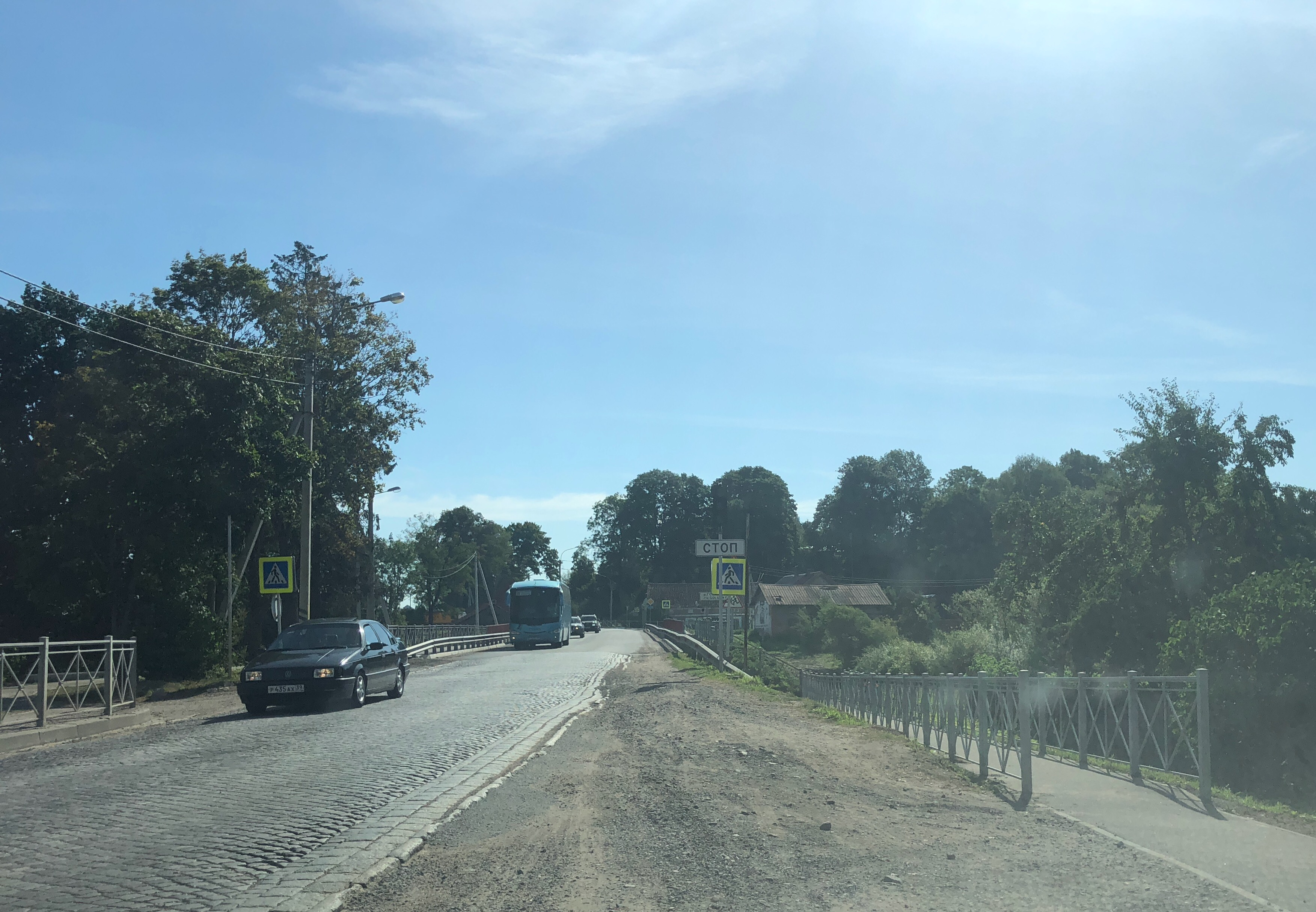 Междуречье (Гросс-Егерсдорф)